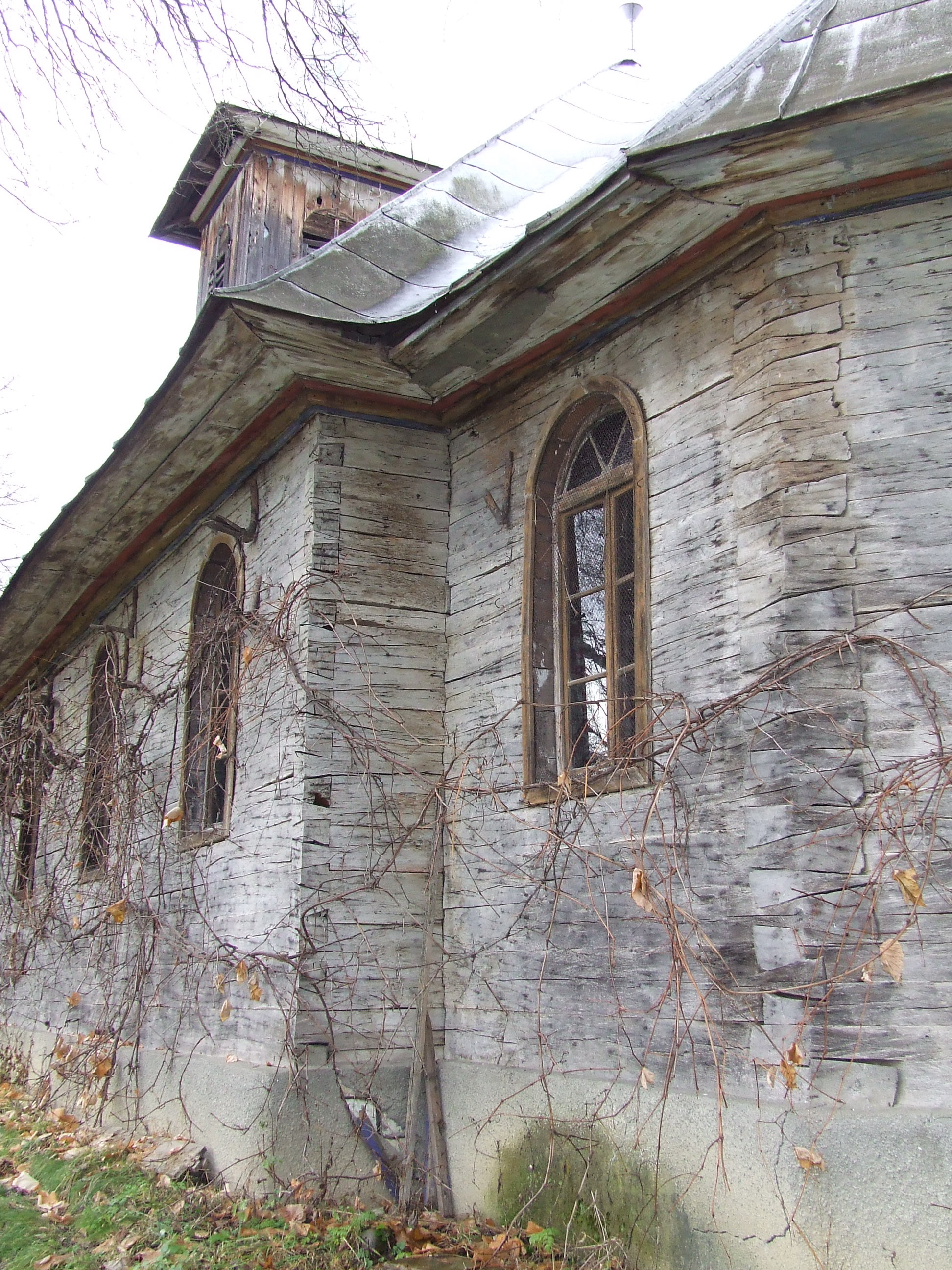 Biserica de lemn din Blidăreşti